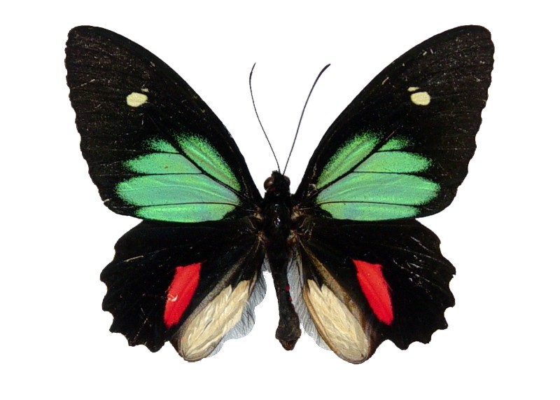 Parides childrenae (male). Corcovado National Park, Costa Rica, May 2002